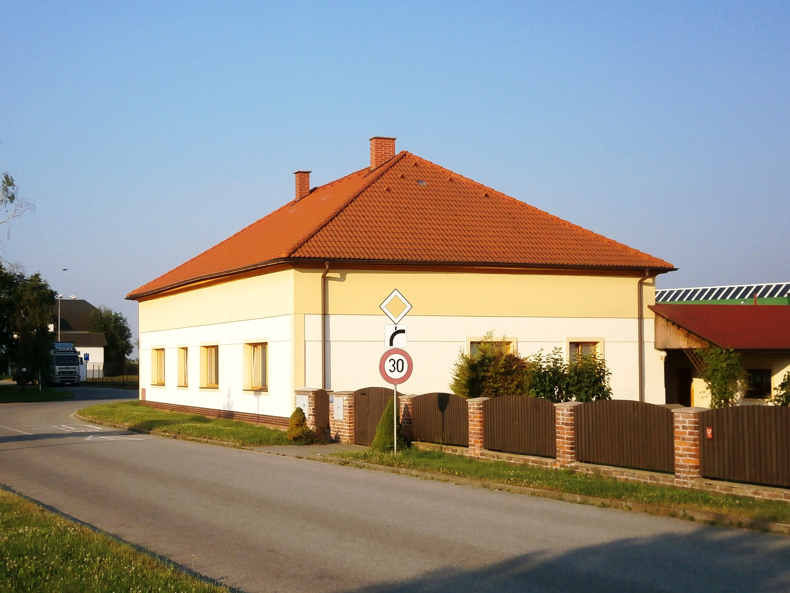 Dvorská čp. 238